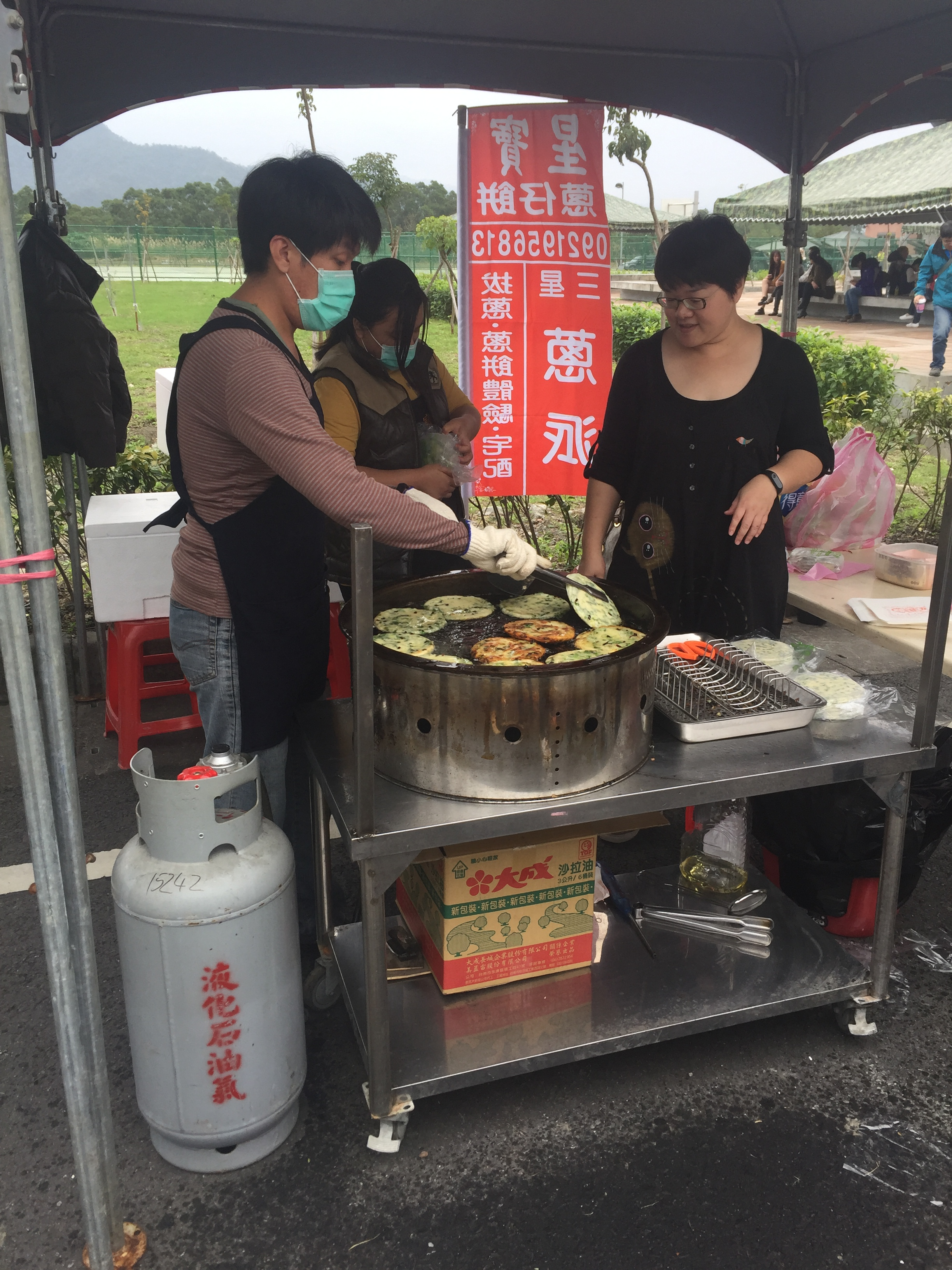 中文（台灣）: 2016年陸軍紅柴林營區開放活動下午，操場北側東西四路上的星寶蔥仔餅攤位。